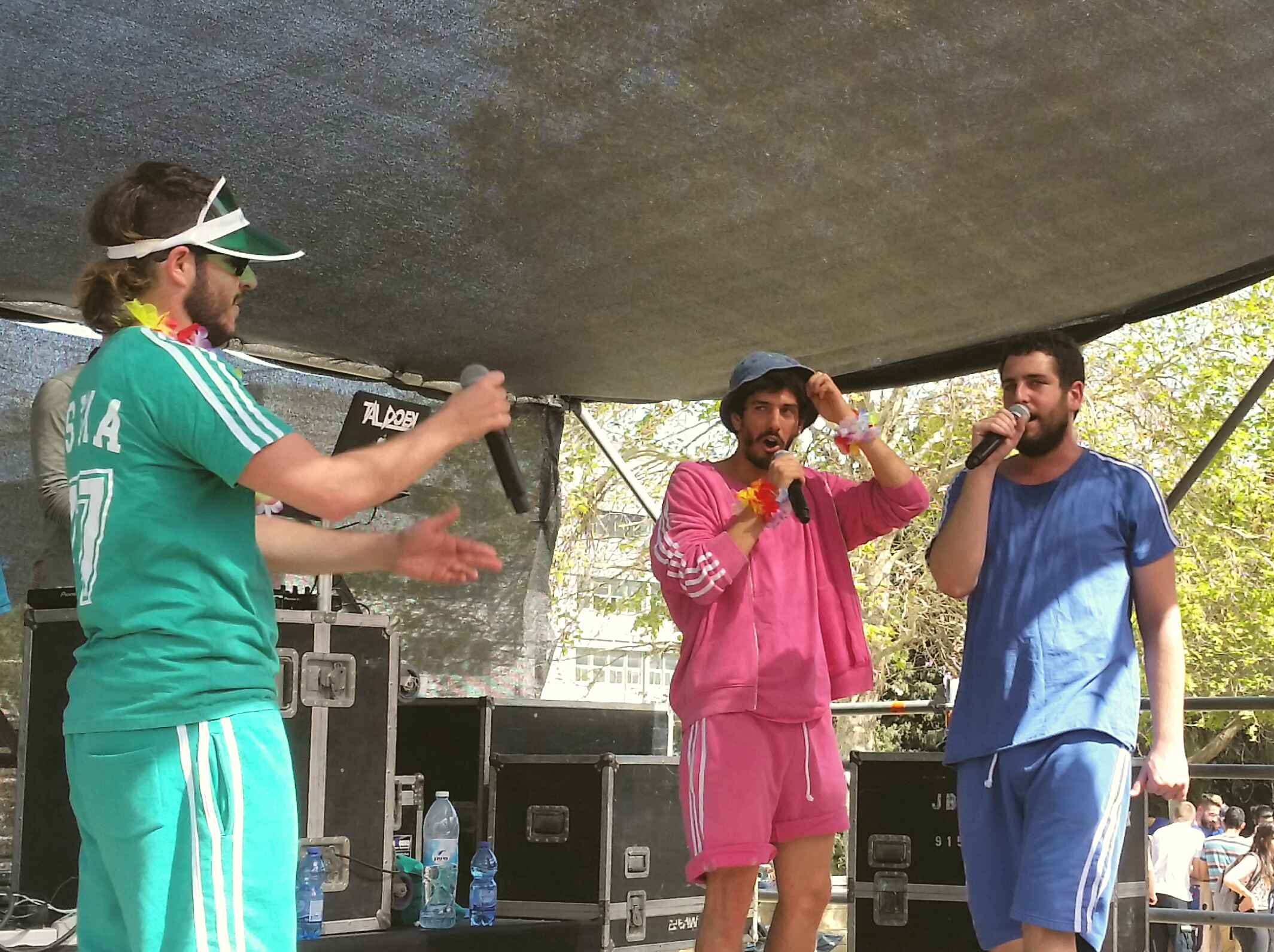 ערוץ הכיבוד, חיפה